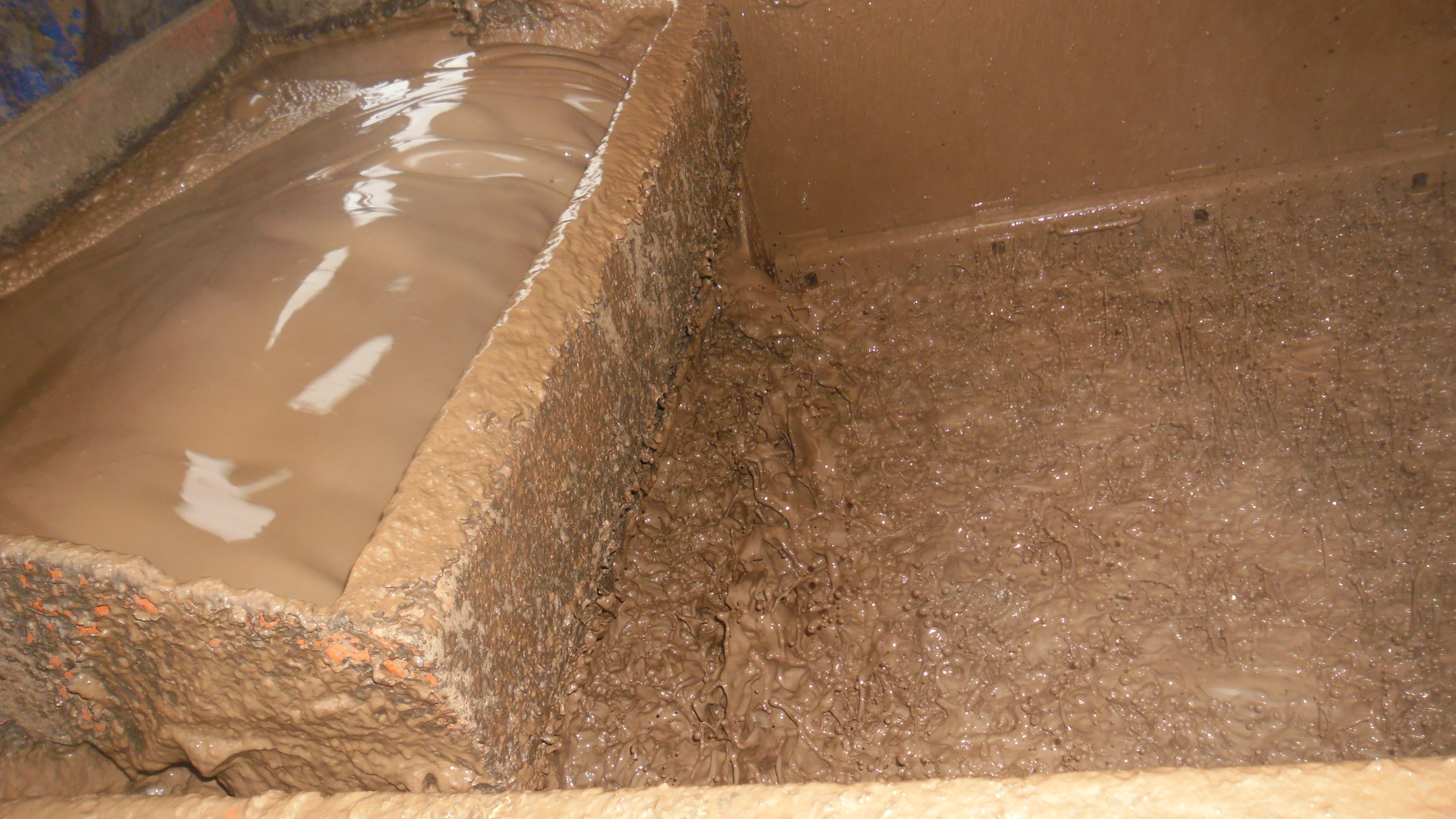 Фото